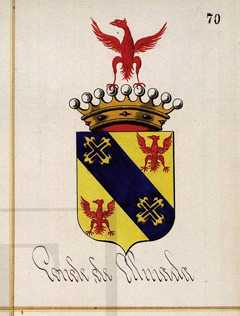 Pertence ao Arquivo da Torre do Tombo.